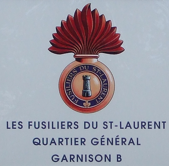 Insigne des Fusiliers du Saint-Laurent sur l'édifice du 77 2e Rue Ouest à Rimouski.